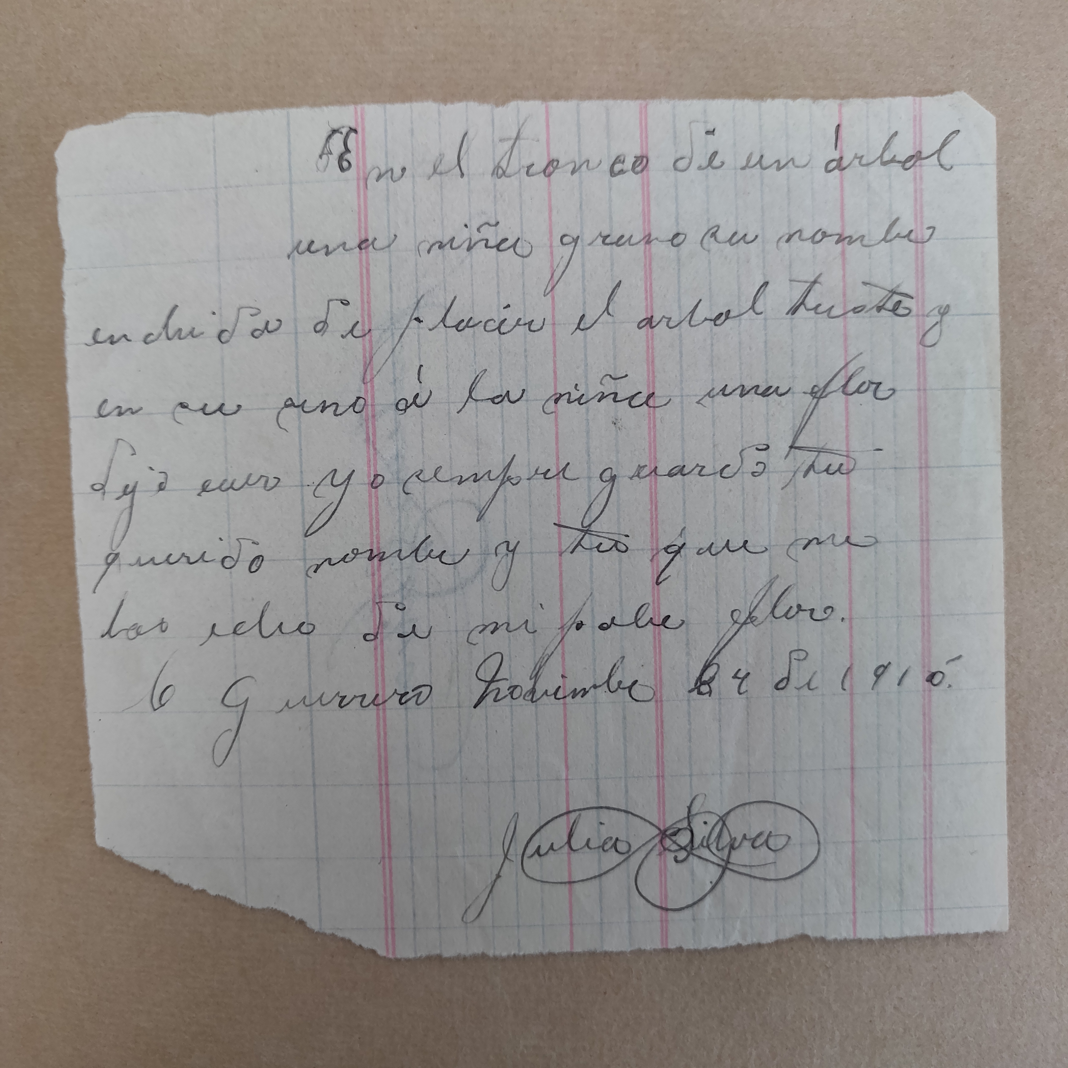 Nota encontrada del poema: Y tú qué has hecho? Con fecha de Noviembre de 1910.